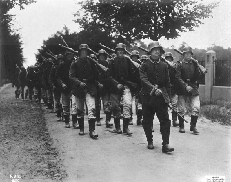 Deutsche Truppen mit den versuchsweise eingeführten neuen Stahlhelmen. Information added by Wikimedia users.